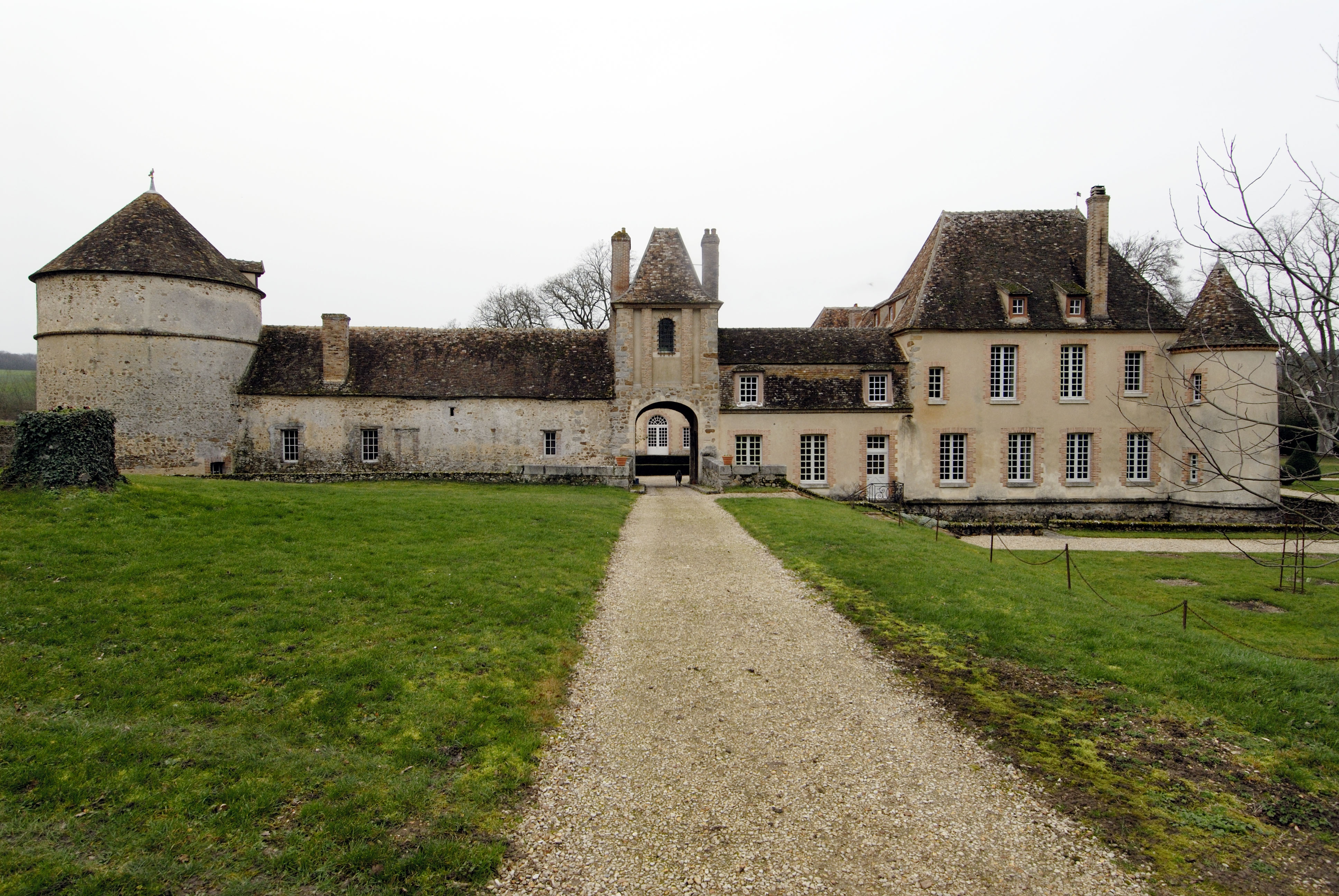 Château de Bois-le-Roi